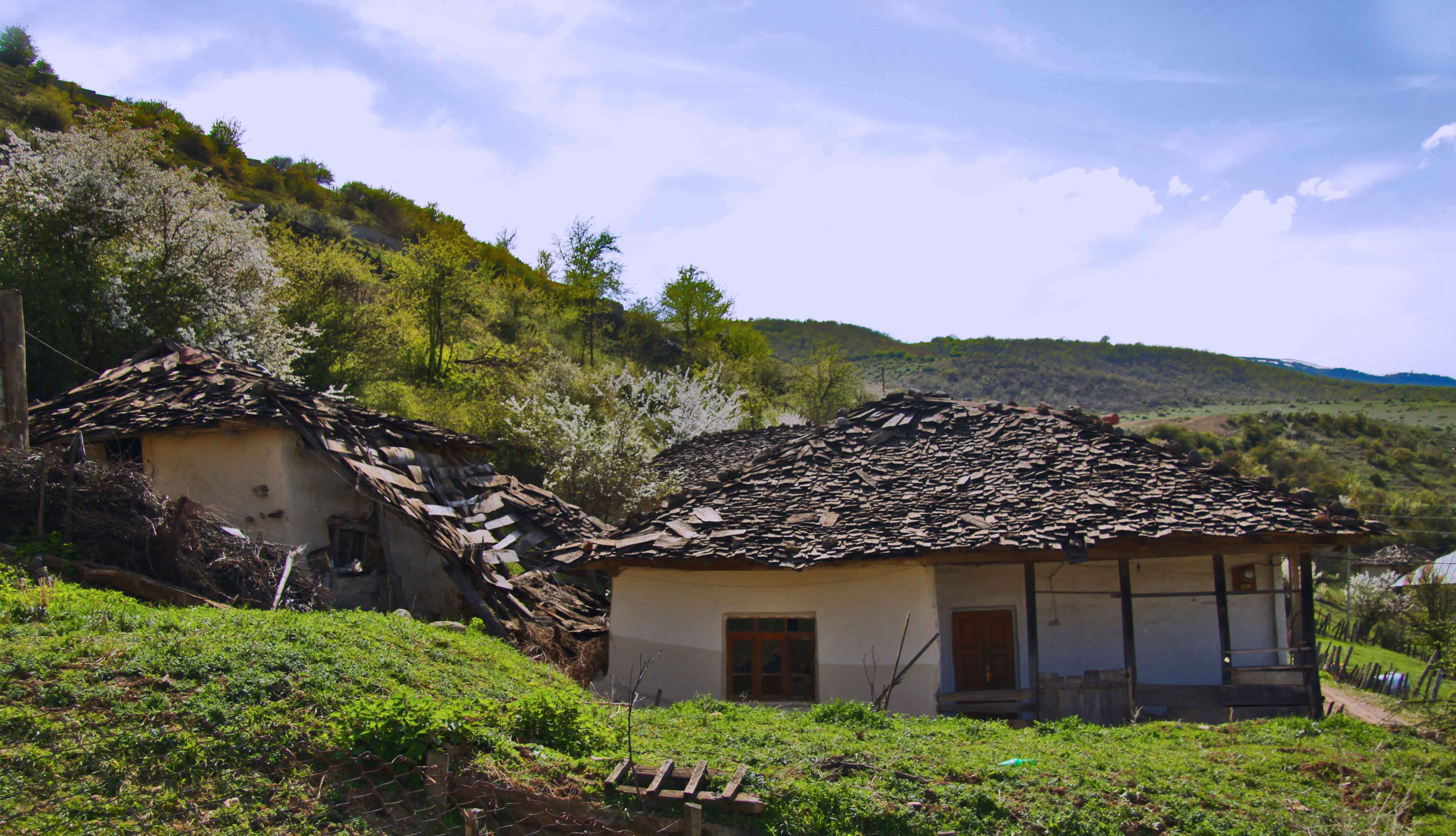 +2012-Iran Mazandaan Kodir-H.Jafari